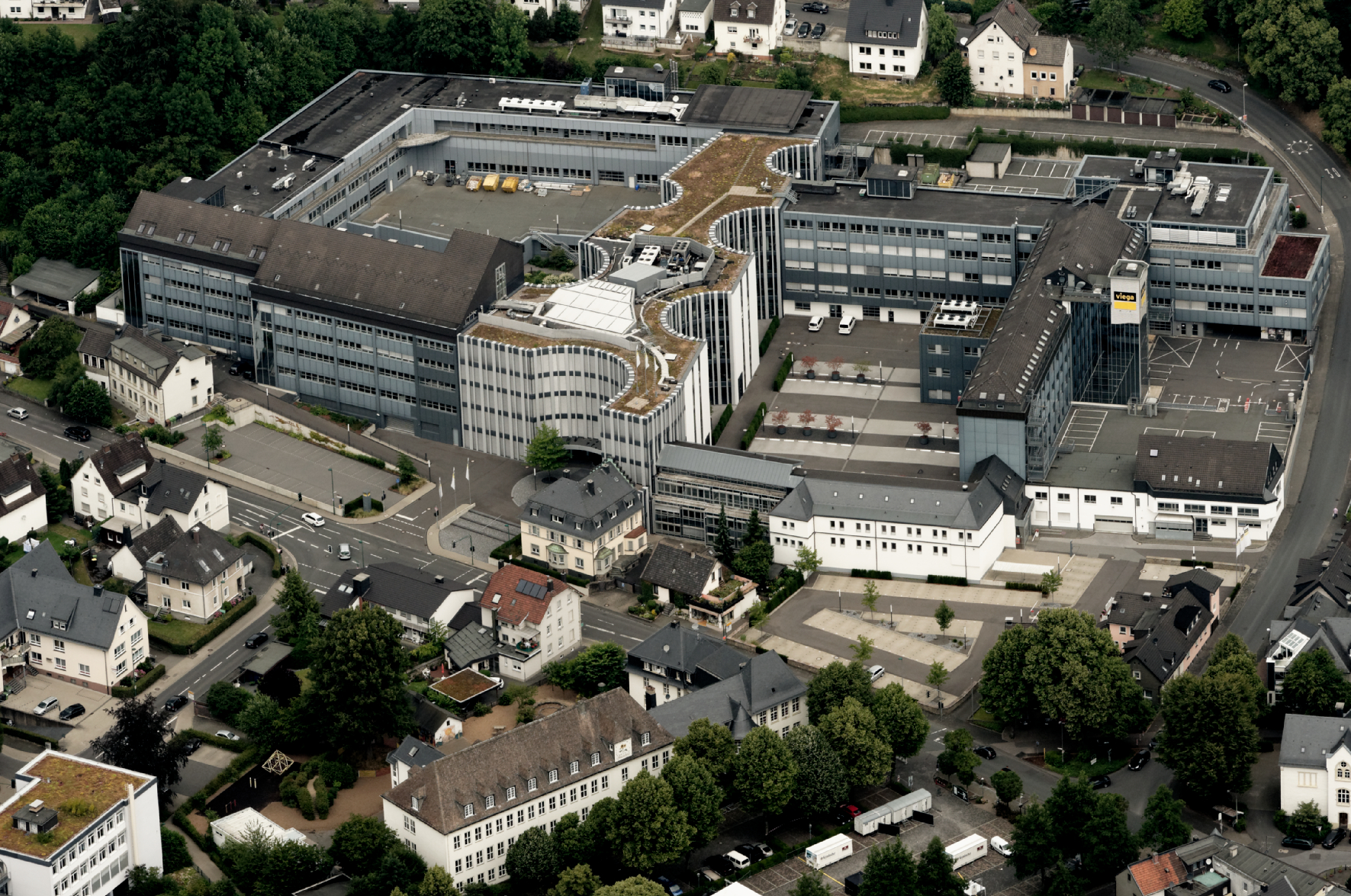 Fotoflug Sauerland Nord. Hauptsitz von Viega in Attendorn. The making of this document was supported by the Community-Budget of Wikimedia Germany.